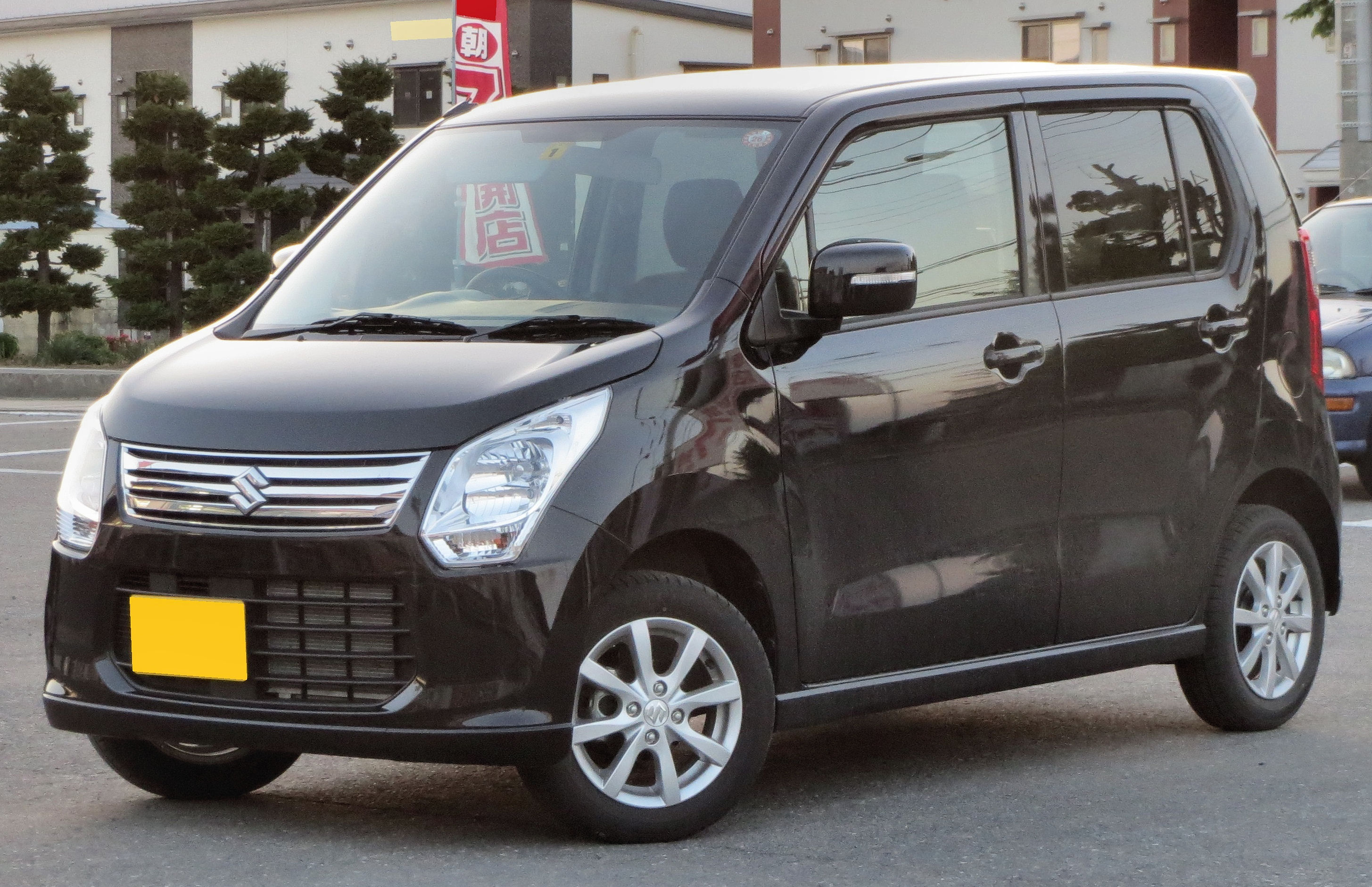 スズキワゴンR FXリミテッド